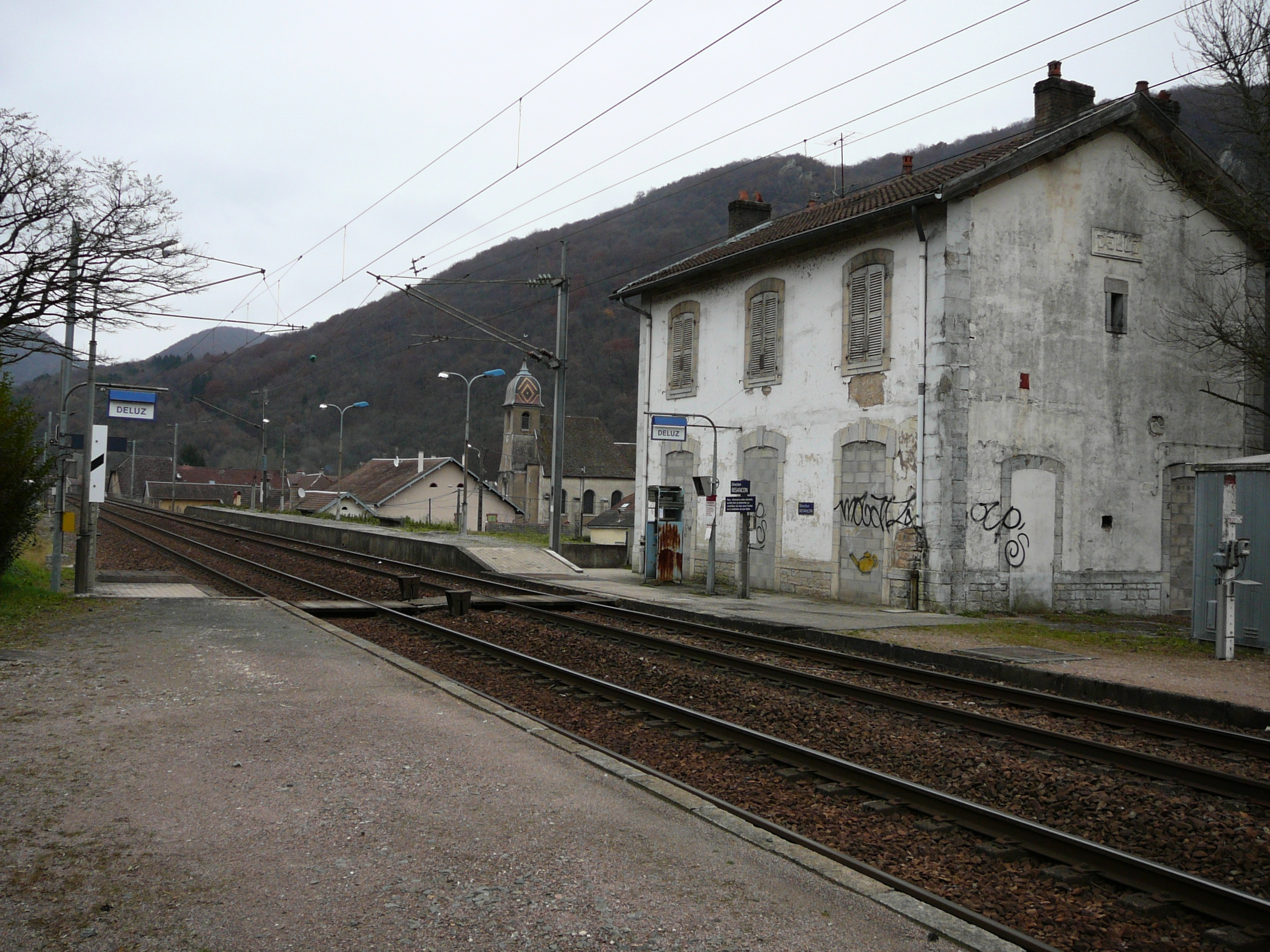 Gare de Deluz, vue vers Montbéliard